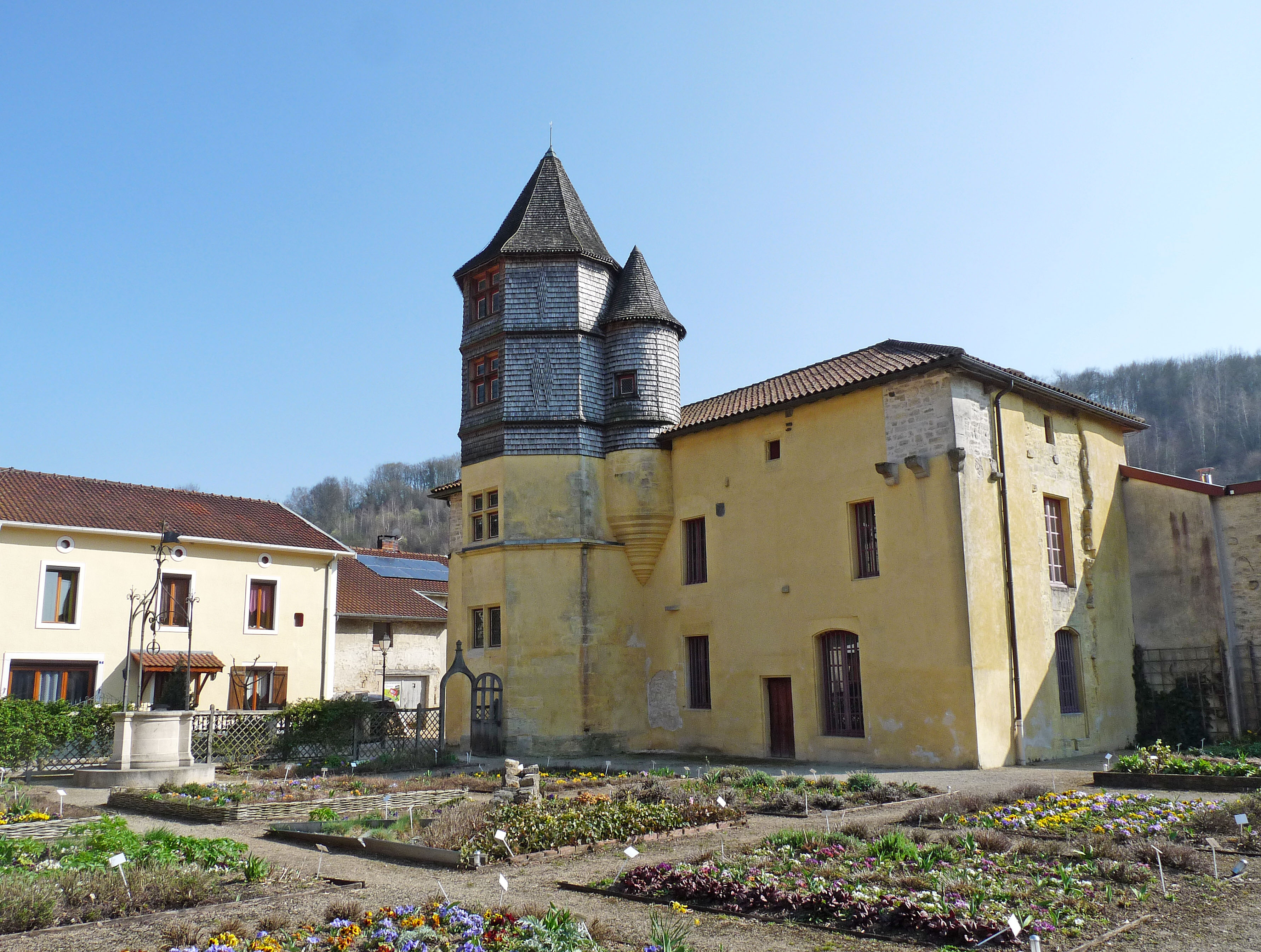 Château de Chevillon (Haute-Marne), aujourd'hui transformé en médiathèque et entouré d'un jardin médiéval